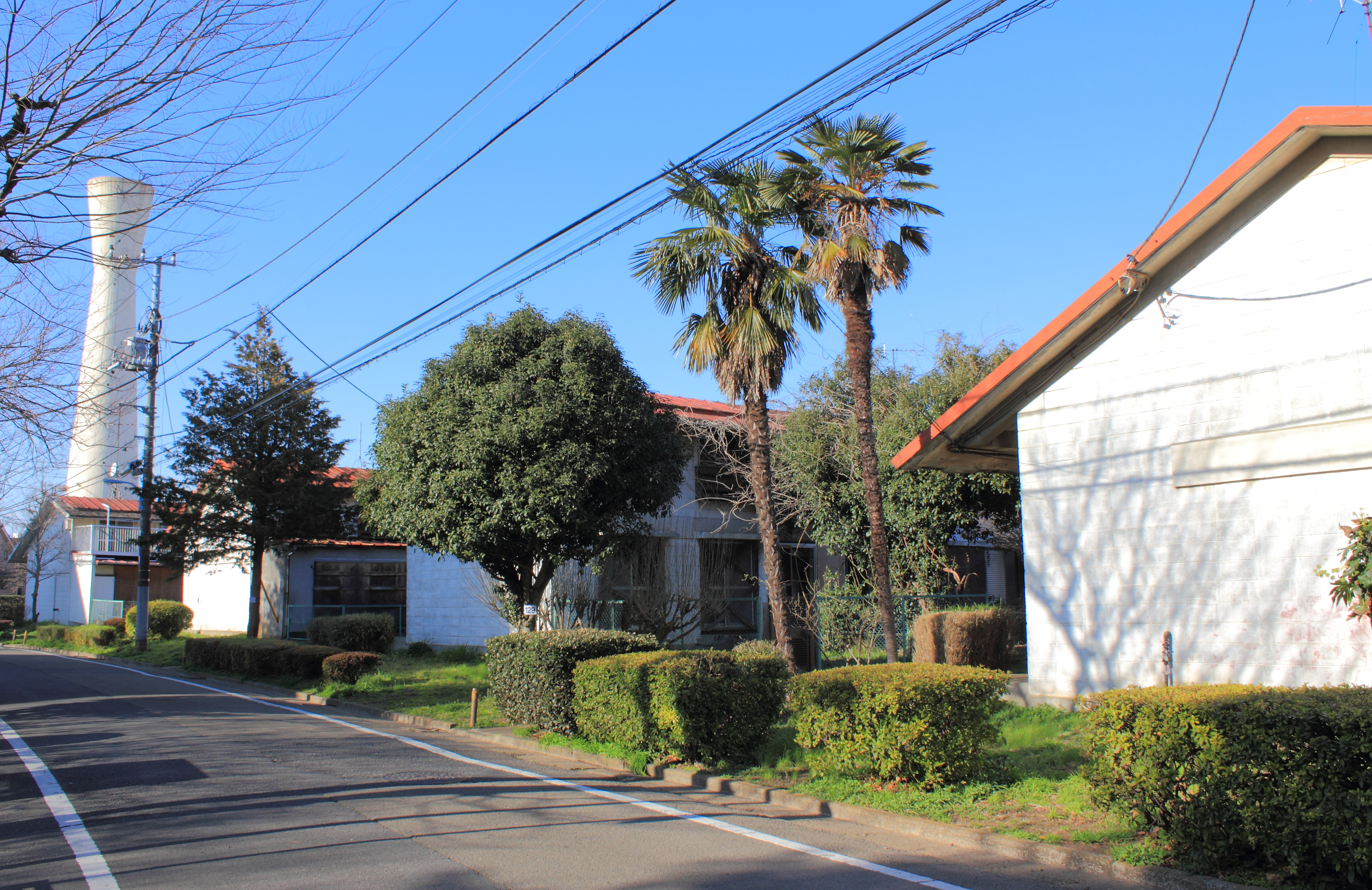 阿佐ヶ谷住宅、前川國男設計棟。東京都杉並区。